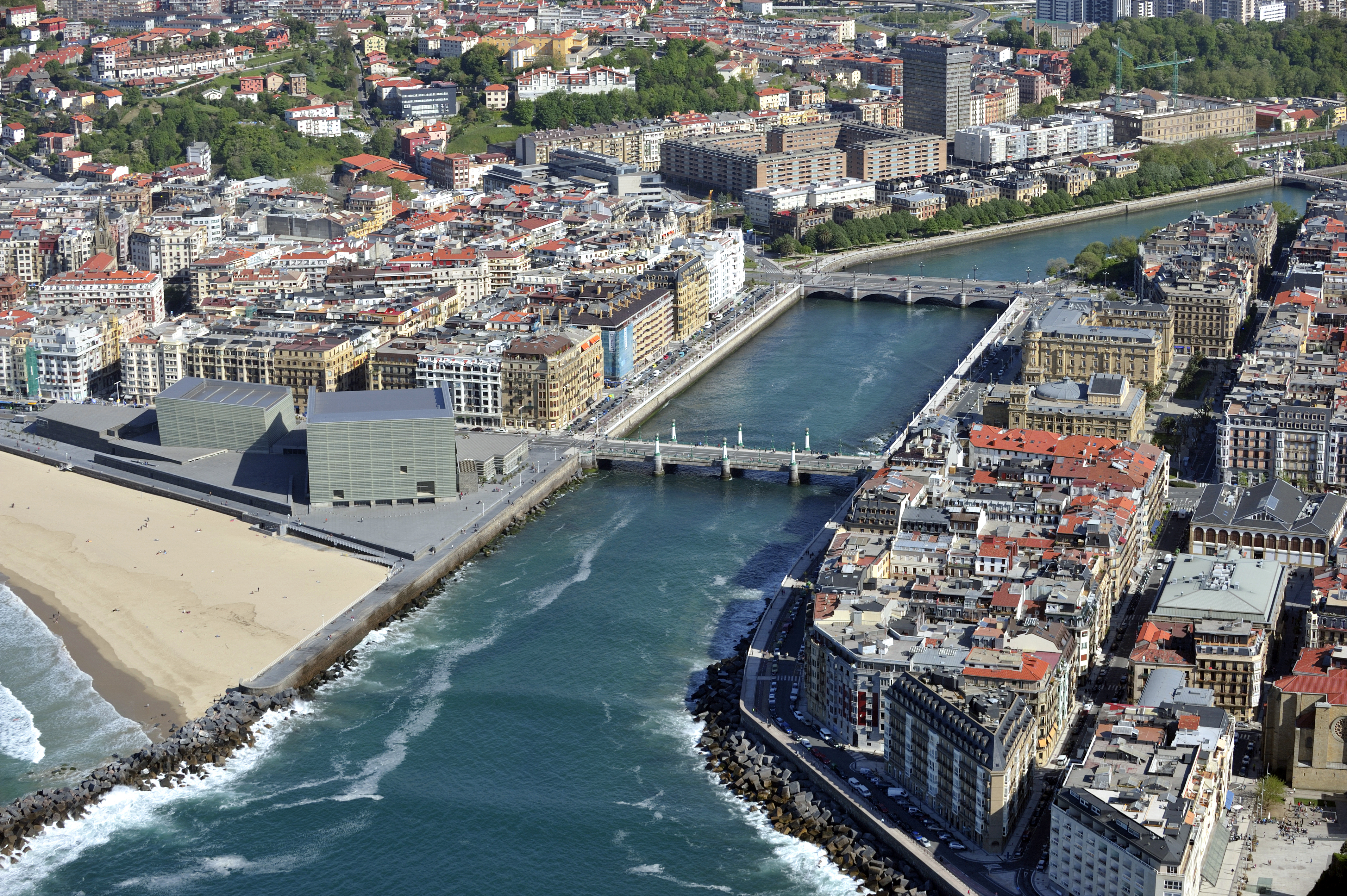 Palacio de Congresos y Auditorio Kursaal,Rafael Moneo. Playa de Gros o La Zurriola, junto a la desembocadura del río Urumea. Sede principal del Festival de Cine de San Sebastián.Nuevo puente, oficialmente puente de la Zurriola, pero conocido popularmenente como puente del Kursaal se convirtió en una de las estampas más típicas de la ciudad por sus farolas con cuerpo esférico y una enorme linterna superior con la misma forma.El edificio Está constituido, principalmente, de dos grandes volúmenes prismáticos que emergen de una plataforma. Cada "cubo", como popularmente se les llama, está formado por un prisma interior de obra de fábrica que configura interiormente una sala, encerradas a su vez por una doble pared formada por paneles translúcidos de vidrio prensado sujetos a una estructura metálica que abarca también los vestíbulos y pasillos. Entre estos dos cubos se forma una gran superficie o terraza transitable con vistas hacia el mar, tanto a la Playa de la Zurriola como a la desembocadura del Urumea. En esta terraza, a dos alturas diferentes (más alta frente al "cubo" pequeño), se organizan distintos conciertos del Festival de Jazz de San Sebastián